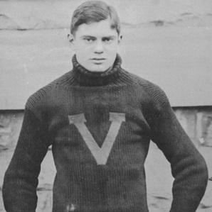 Vanderbilt guard W. E. "Frog" Metzger circa 1910